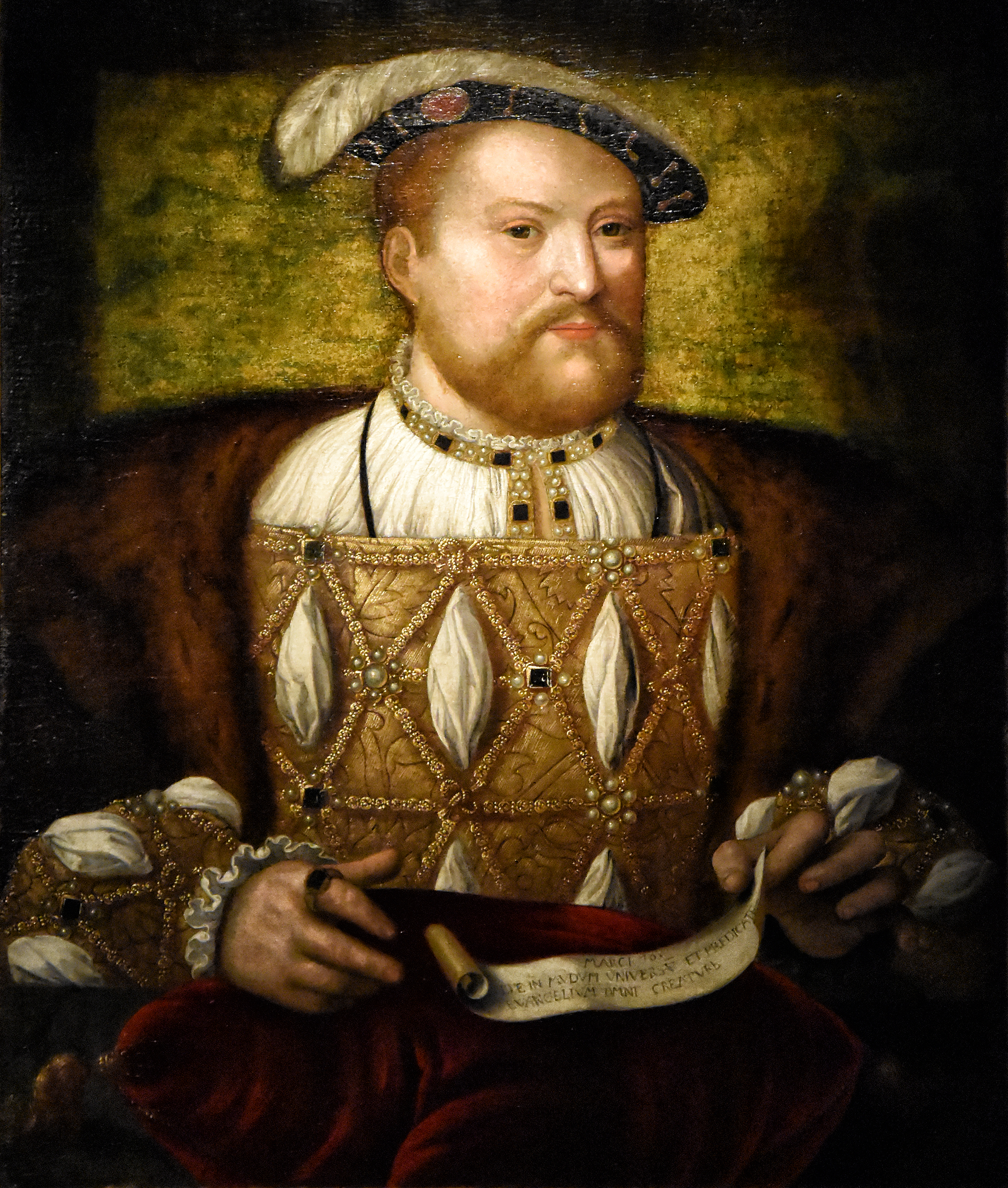 Kopie naar Joos van Cleve - Hendrik VIII - Hever Castle